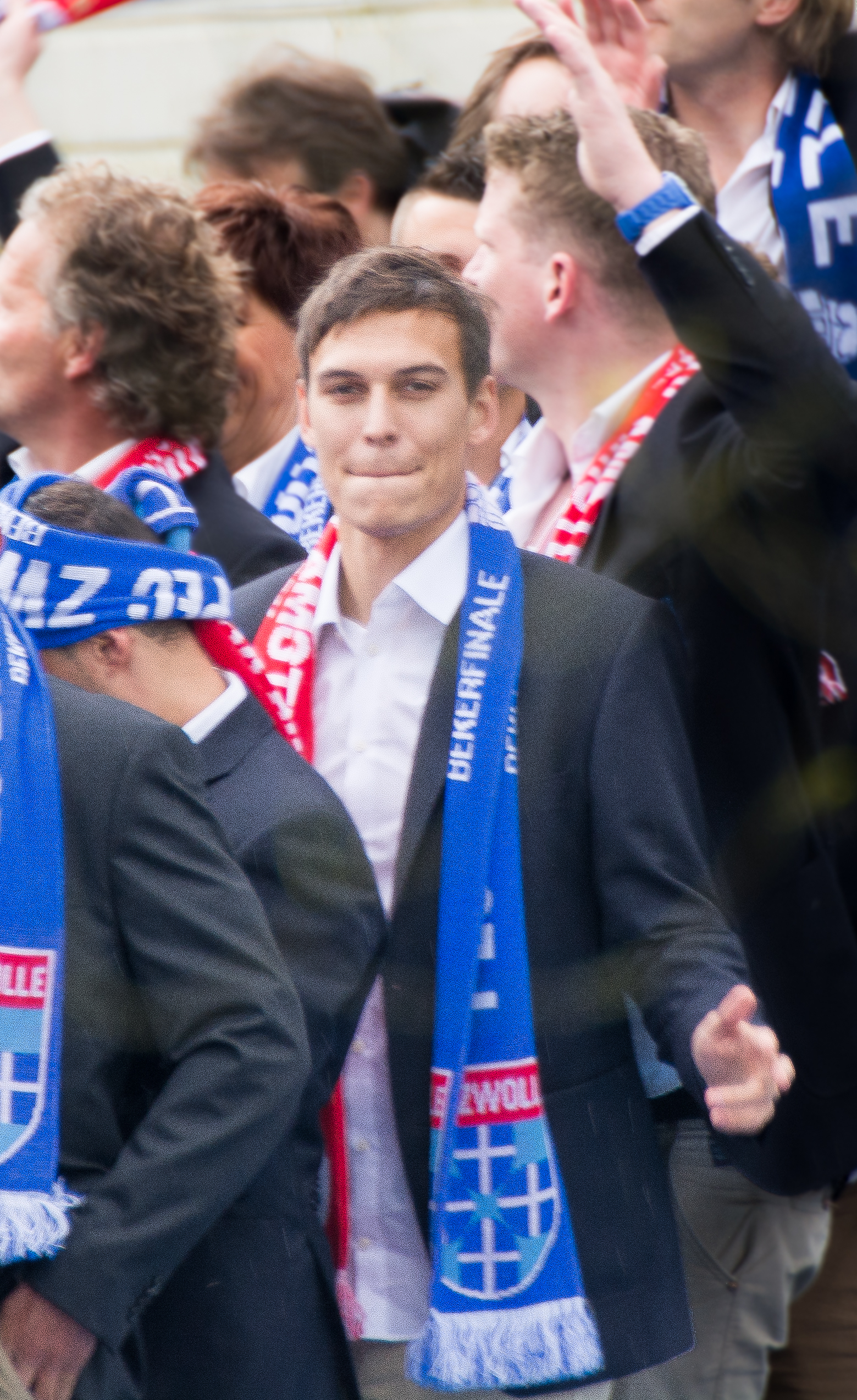 Trent Sainsbury tijdens de huldiging van de KNVB beker op de Zwolse stadsgracht.